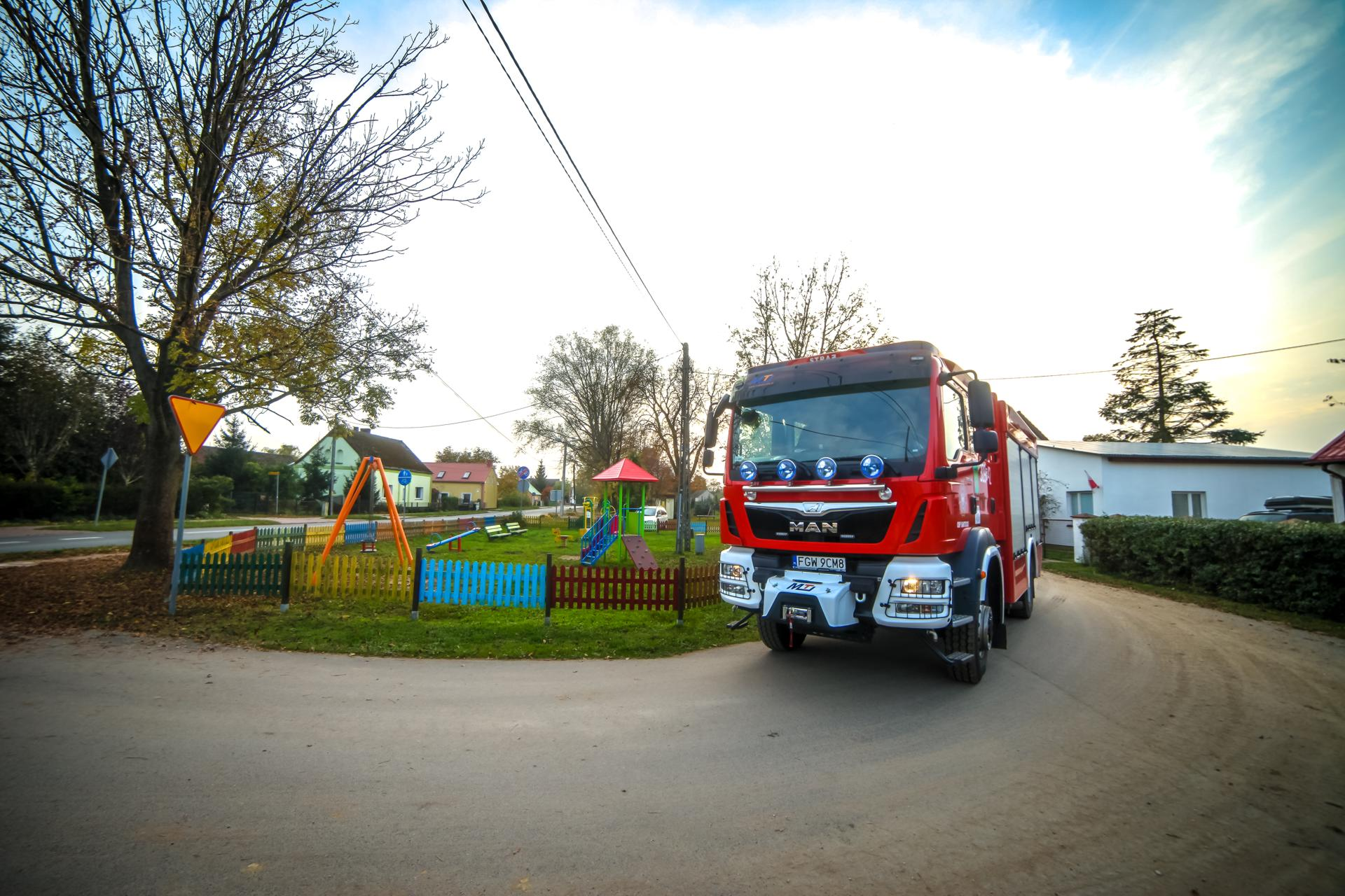 OSP Santocko